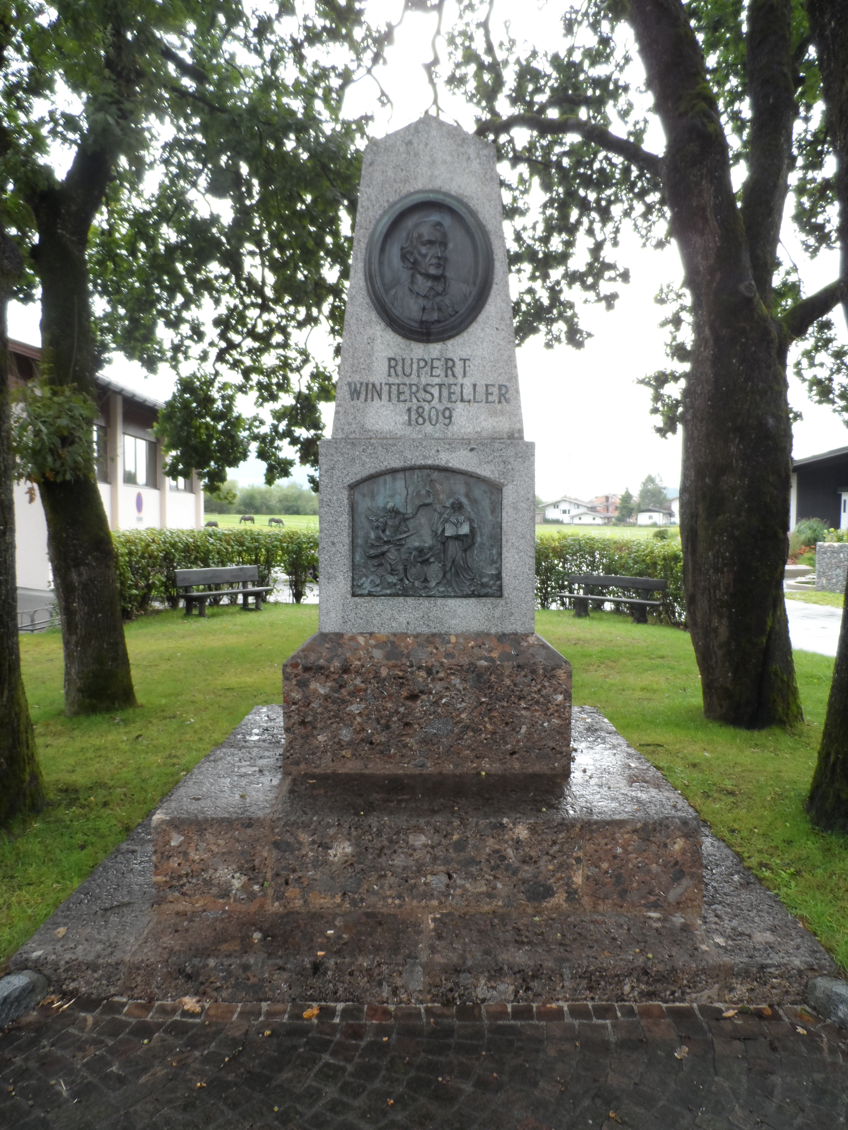 Wintersteller-Denkmal - bei Dorfstraße 10, Kirchdorf in Tirol